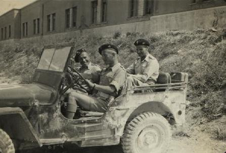 Żołnierze 7 ppanc. w Ankonie w 1946. Baza 7 Pułku Pancernego.